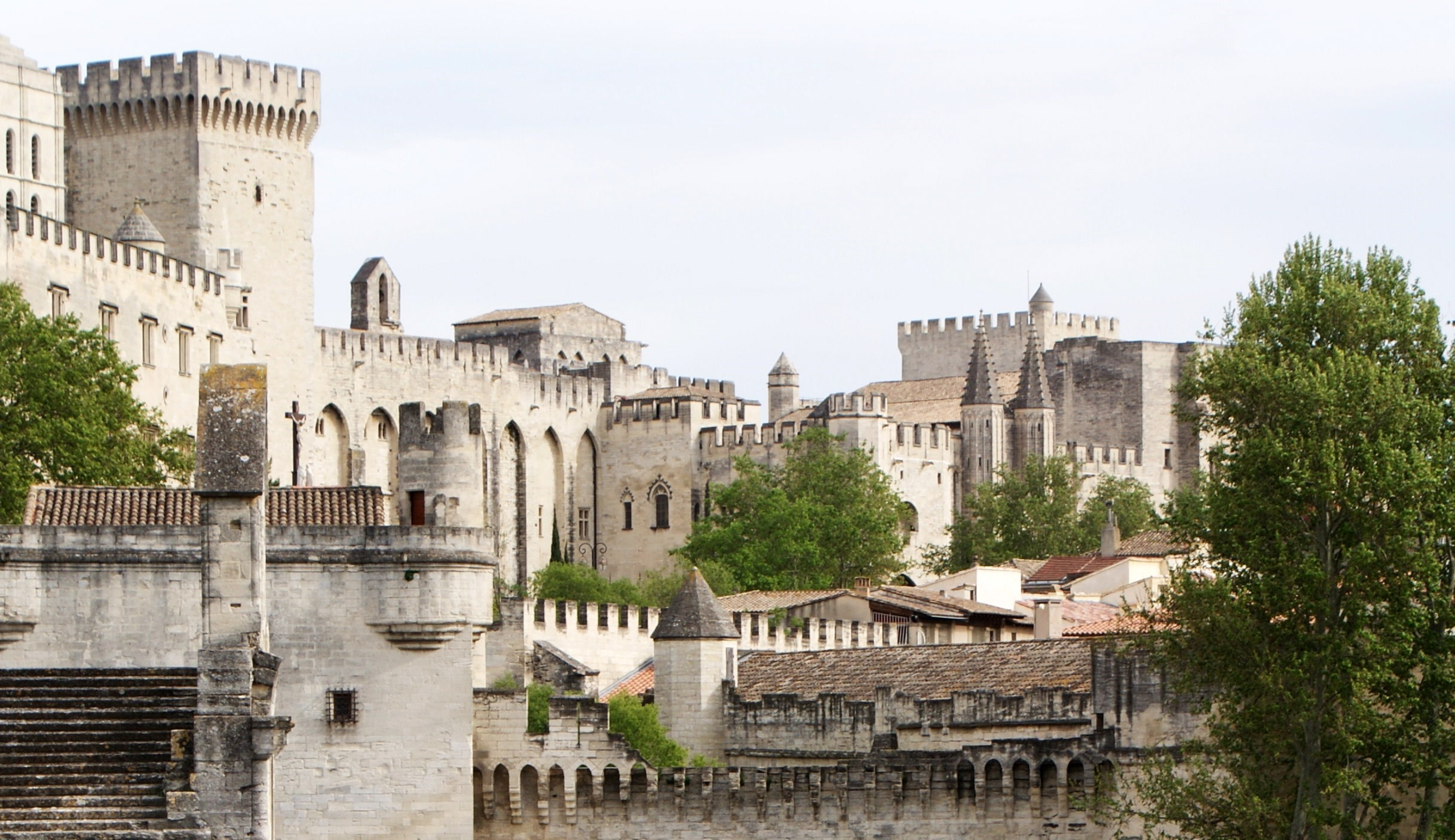 Avignone palazzo dei papi e o panorama città